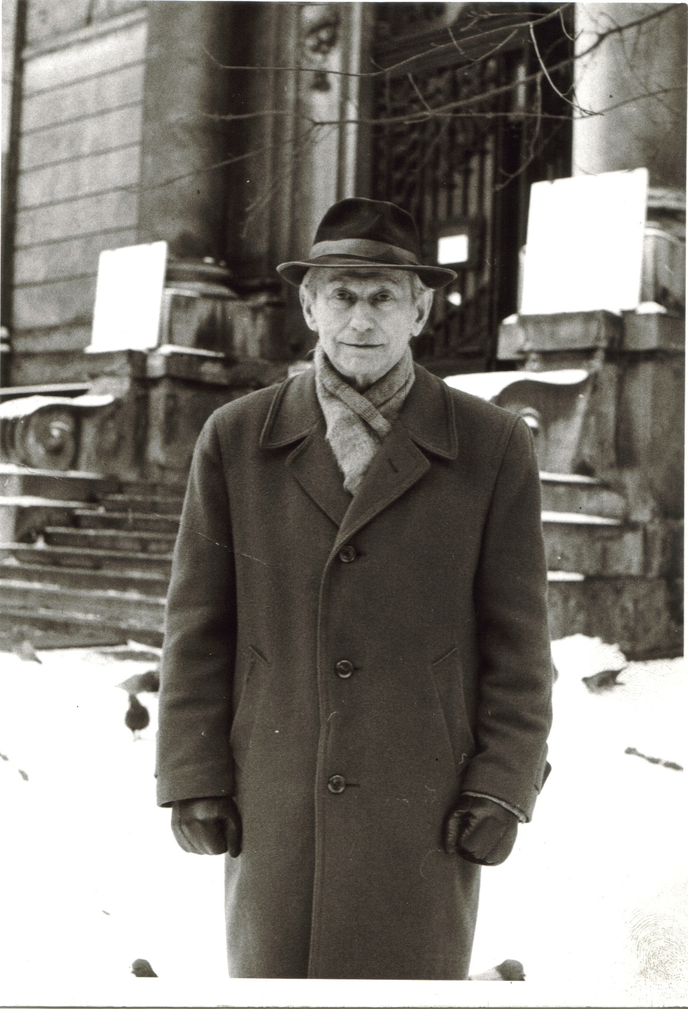 Czesław_Kiełbiński_1